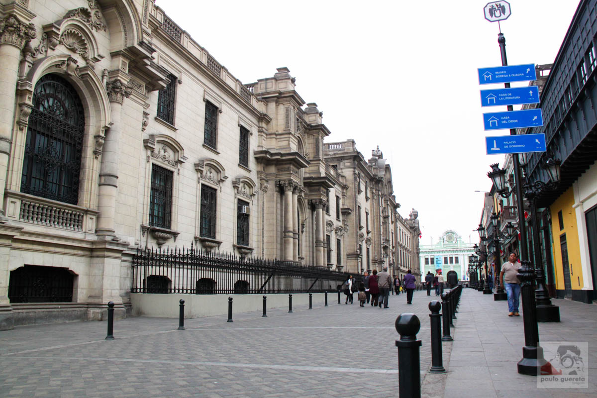 Jirón Carabaya, Lima, Perú